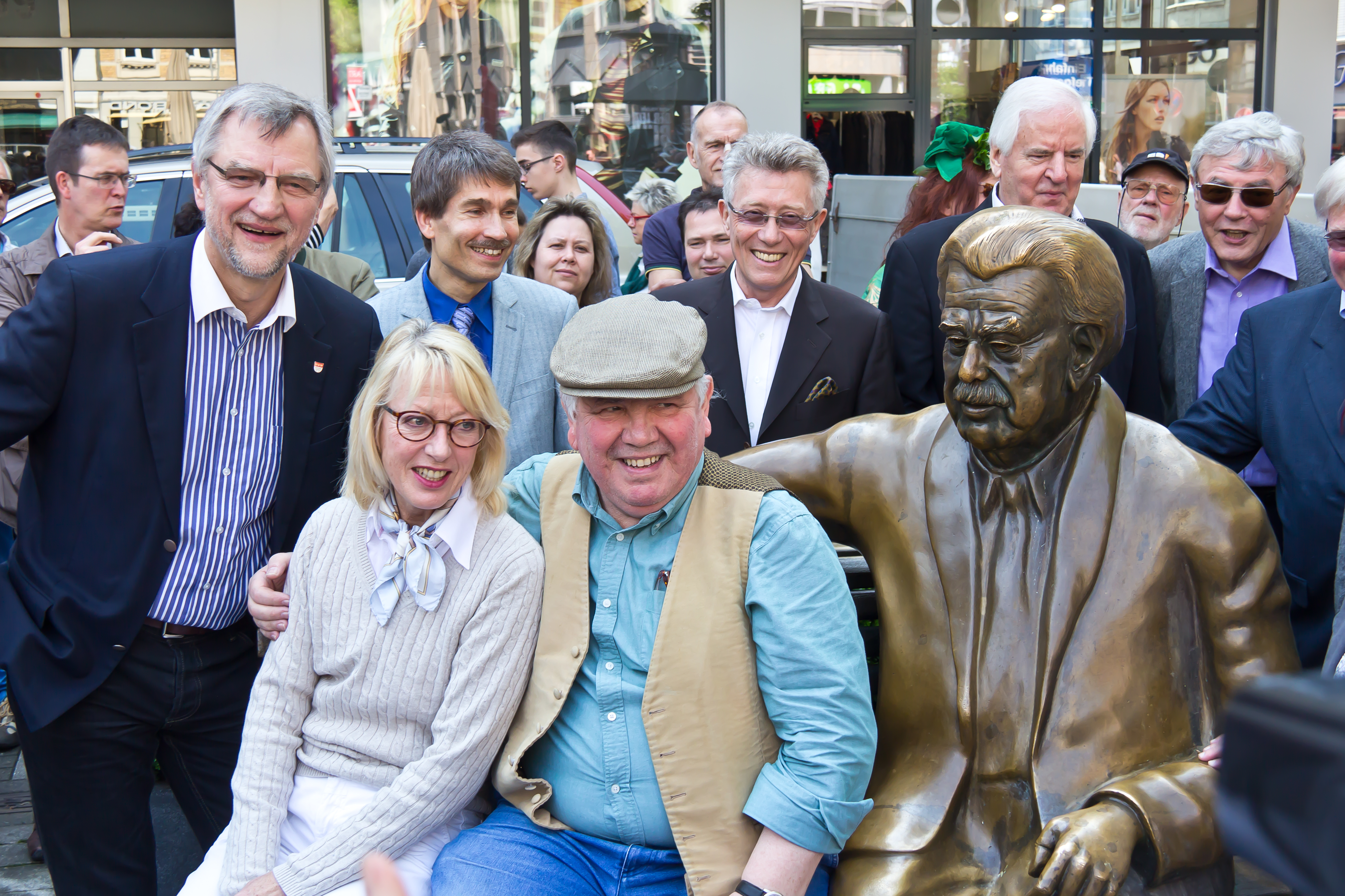 Enthüllung des Willy-Millowitsch-Denkmals auf dem Willy-Millowitsch-Platz (nach dem Umzug vom Eisenmarkt) durch Bürgermeisterin Elfi-Scho-Antwerpers, Peter Millowitsch und Bezirksbürgermeister Andreas Hupke (Stadtbezirk Köln-Innenstadt) Foto: Peter Millowitsch sitzt auf dem Willy-Millowitsch-Denkmal. Links stehend: Andreas Hupe, sitzend: Elfi-Scho-Antwerpers